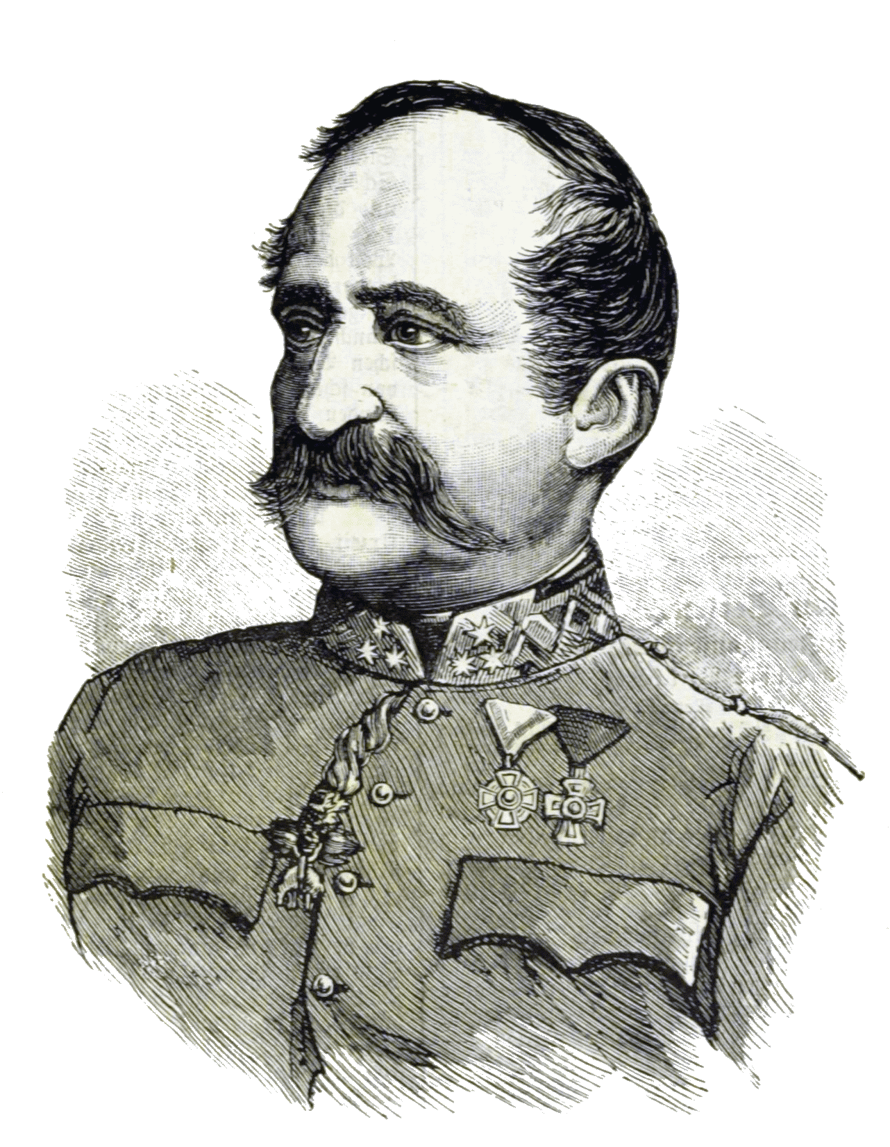 Karl Ludwig Graf von Grünne-Pinchard (1808–1884), Austrian general